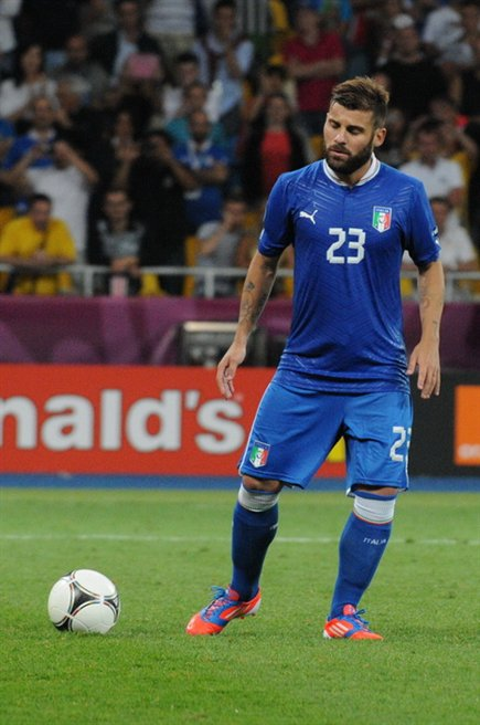 Antonio Nocerino at Euro 2012 match against England